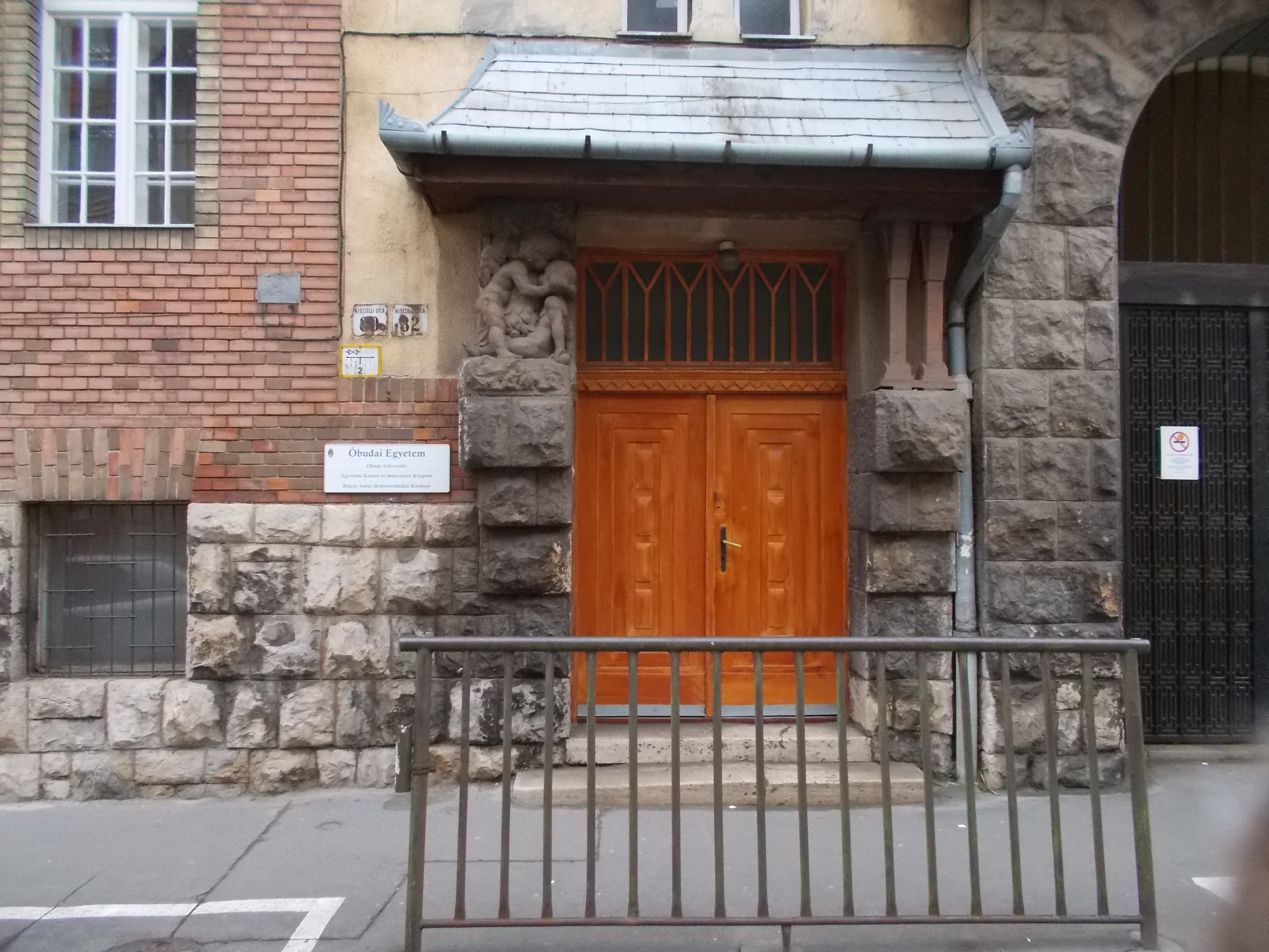 Óbudai Egyetem. Egyetemi Kutató- és Innovációs Központ (EKIK). Bejczy Antal iRobottechnikai Központ. - Budapest, Kiscelli u. 78-80